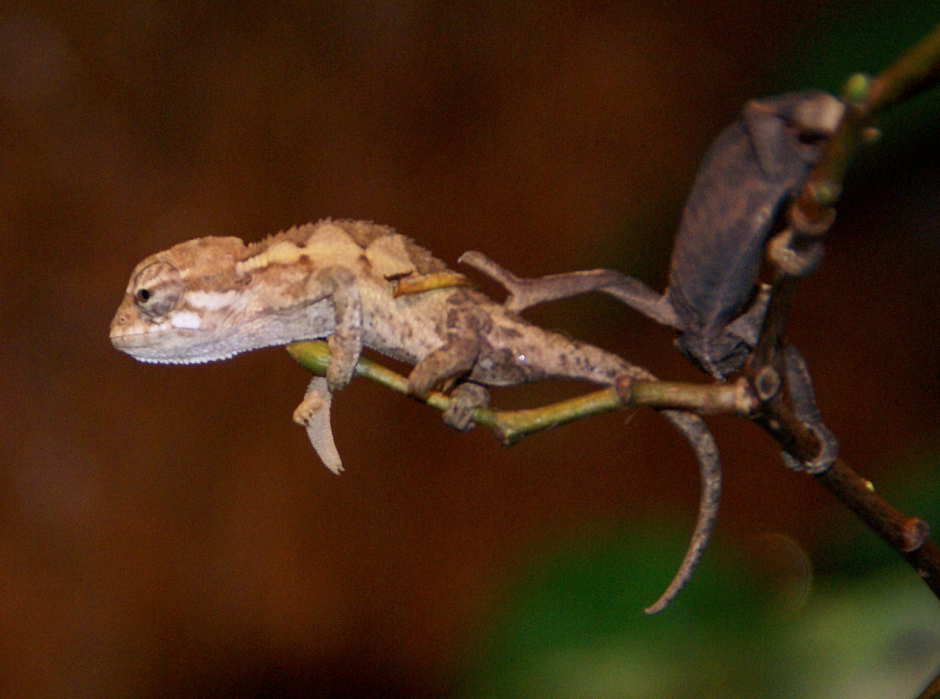 neugeborenes Chamaeleo rudis